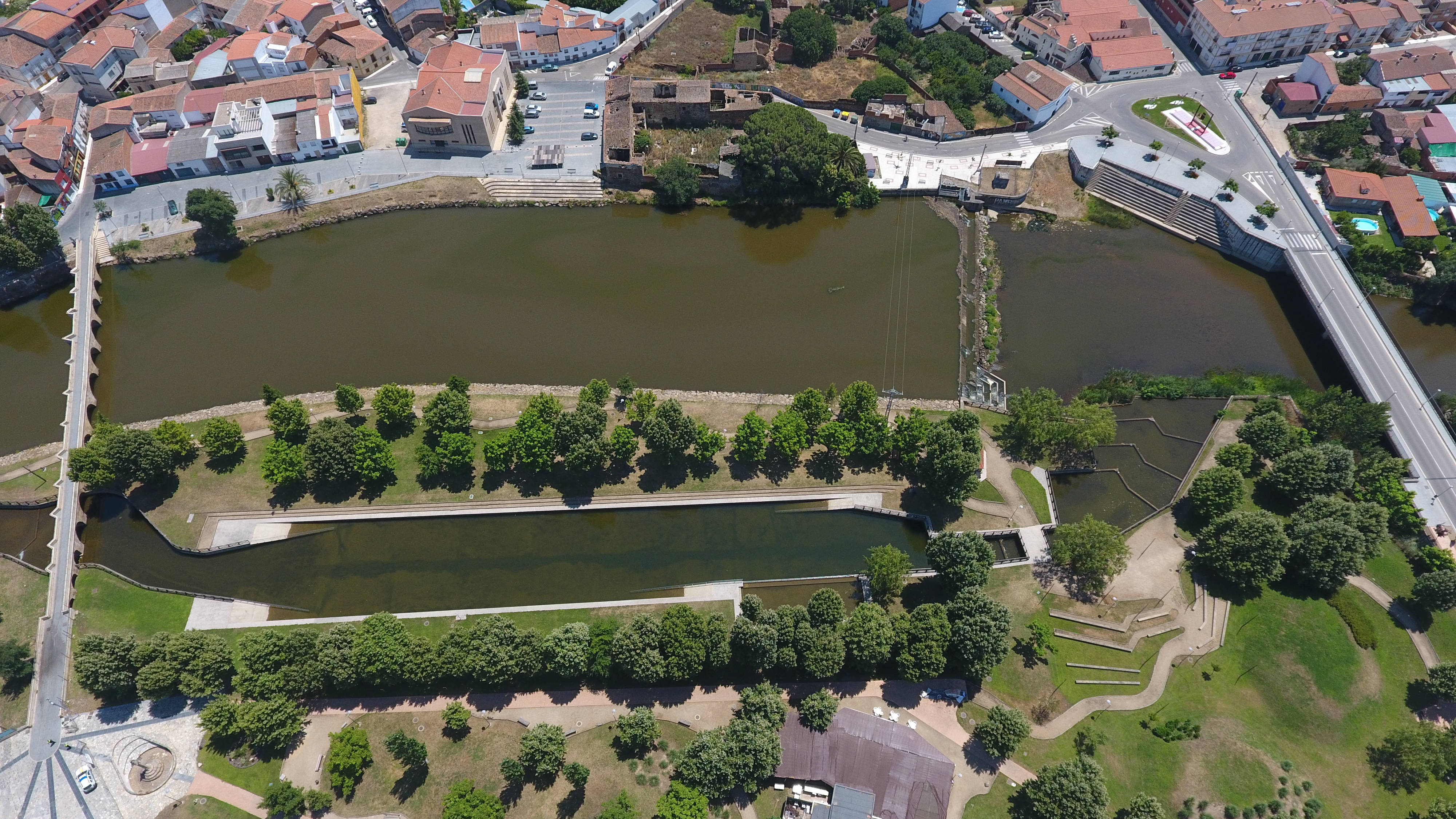 Zona del rio a vista de pájaro en la localidad de Moraleja (Cáceres)